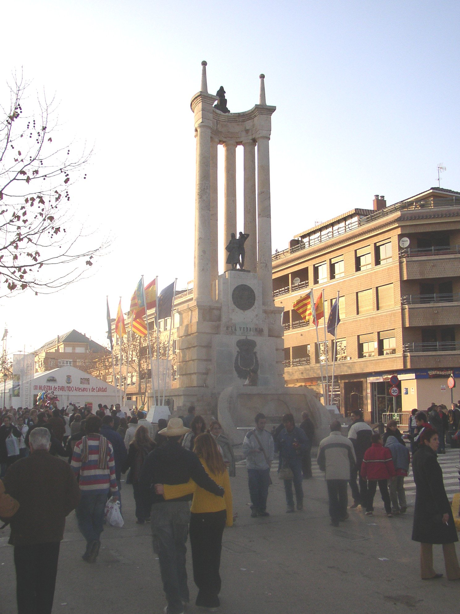 Requena és un municipi valencià a la comarca de la Plana d'Utiel. Monumento a la vendimia.